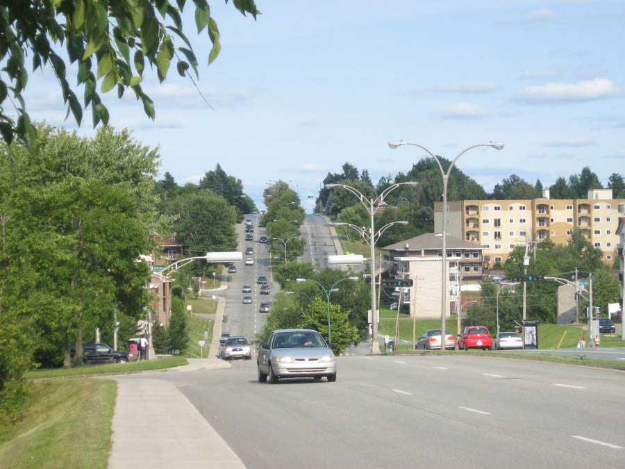 Boulevard de Portland